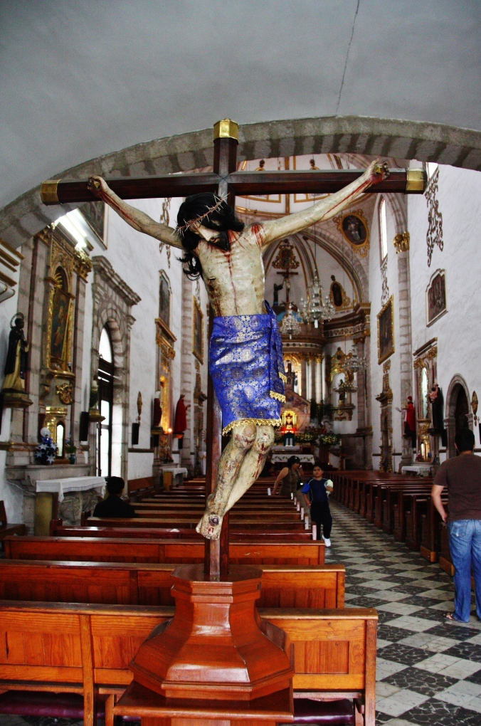 Templo de San Francisco, Morelia